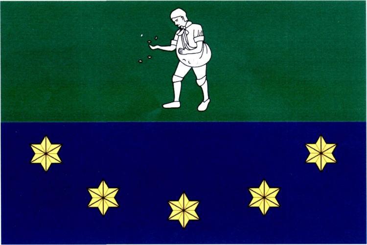 vlajka, Rešice, okres Znojmo